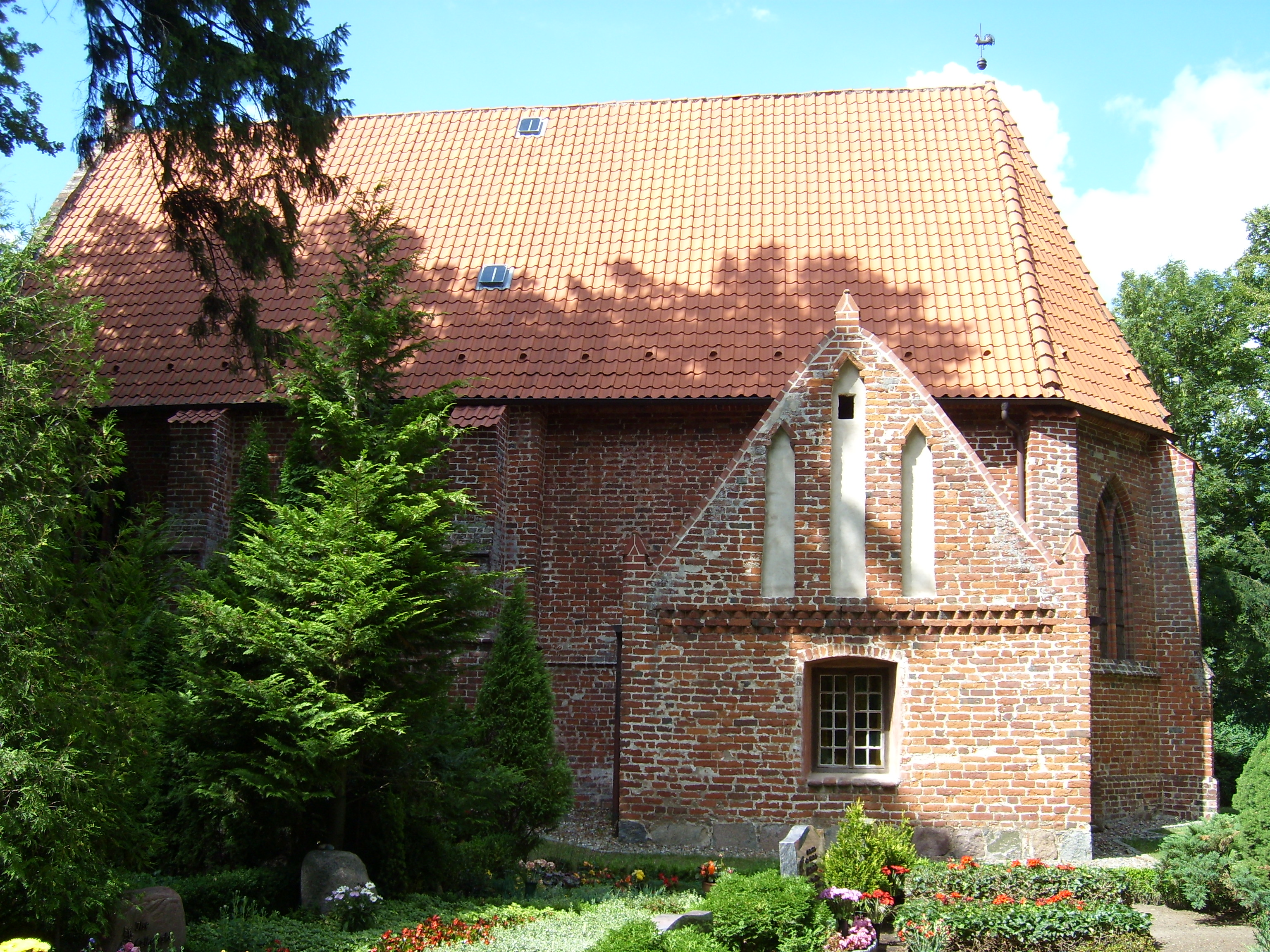 Kirche Weitenhagen, Südseite